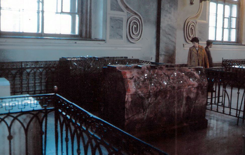 Keisari Aleksanteri II:n ja hänen puolisonsa haudat